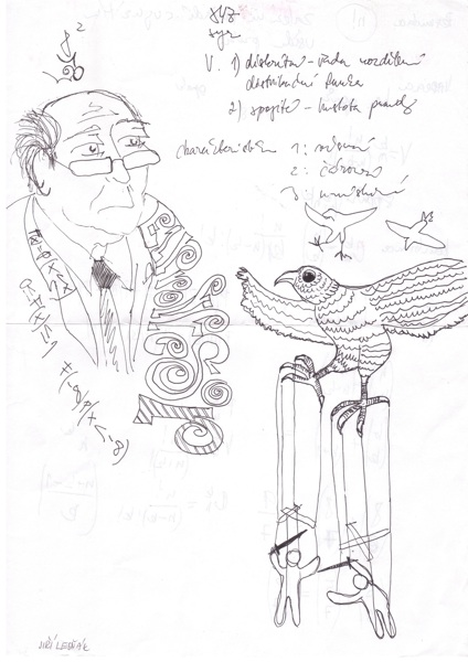 Ukázka studenstského Doodle artu.